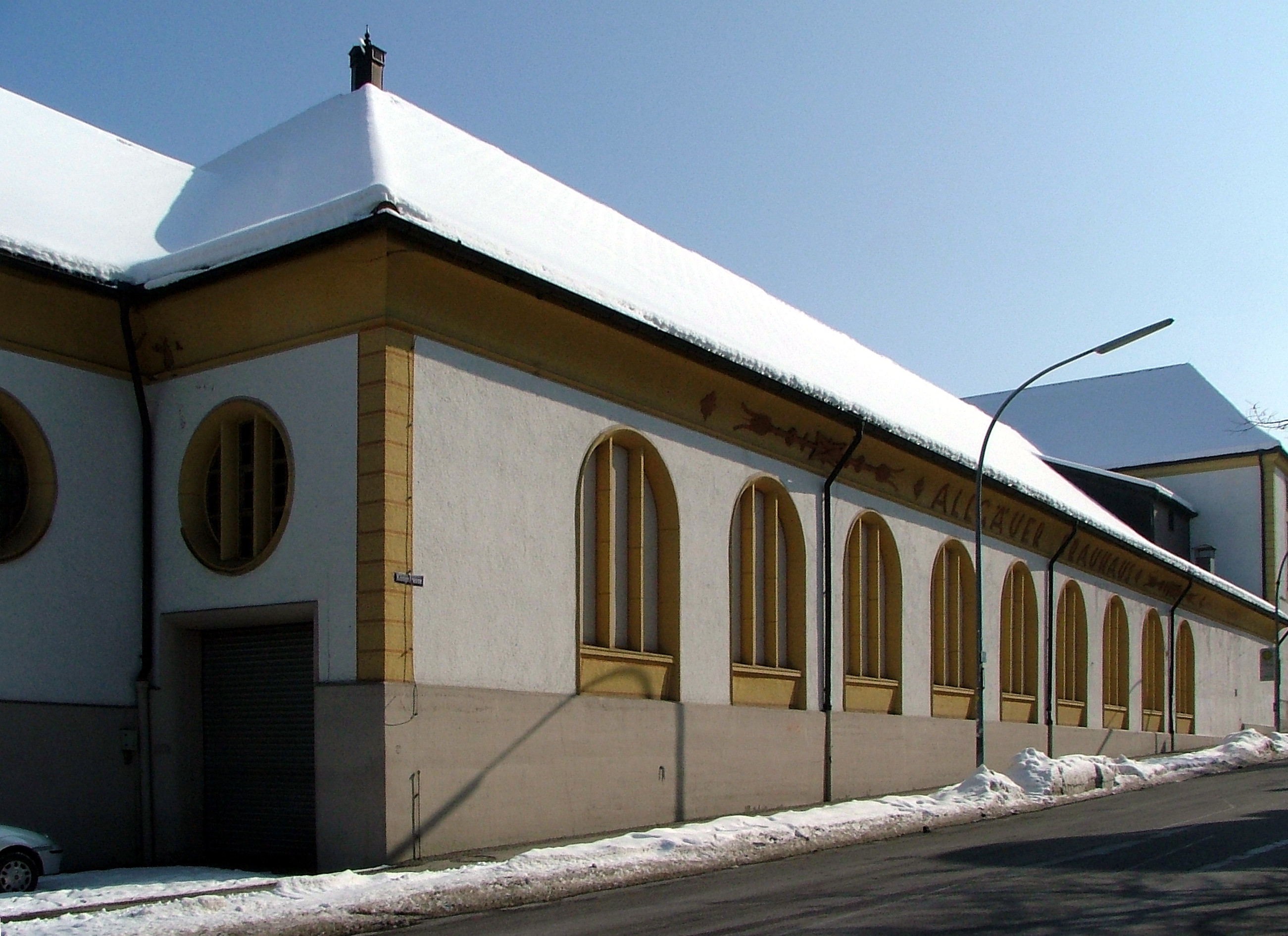 Abfüllhalle des Allgäuer Brauhauses